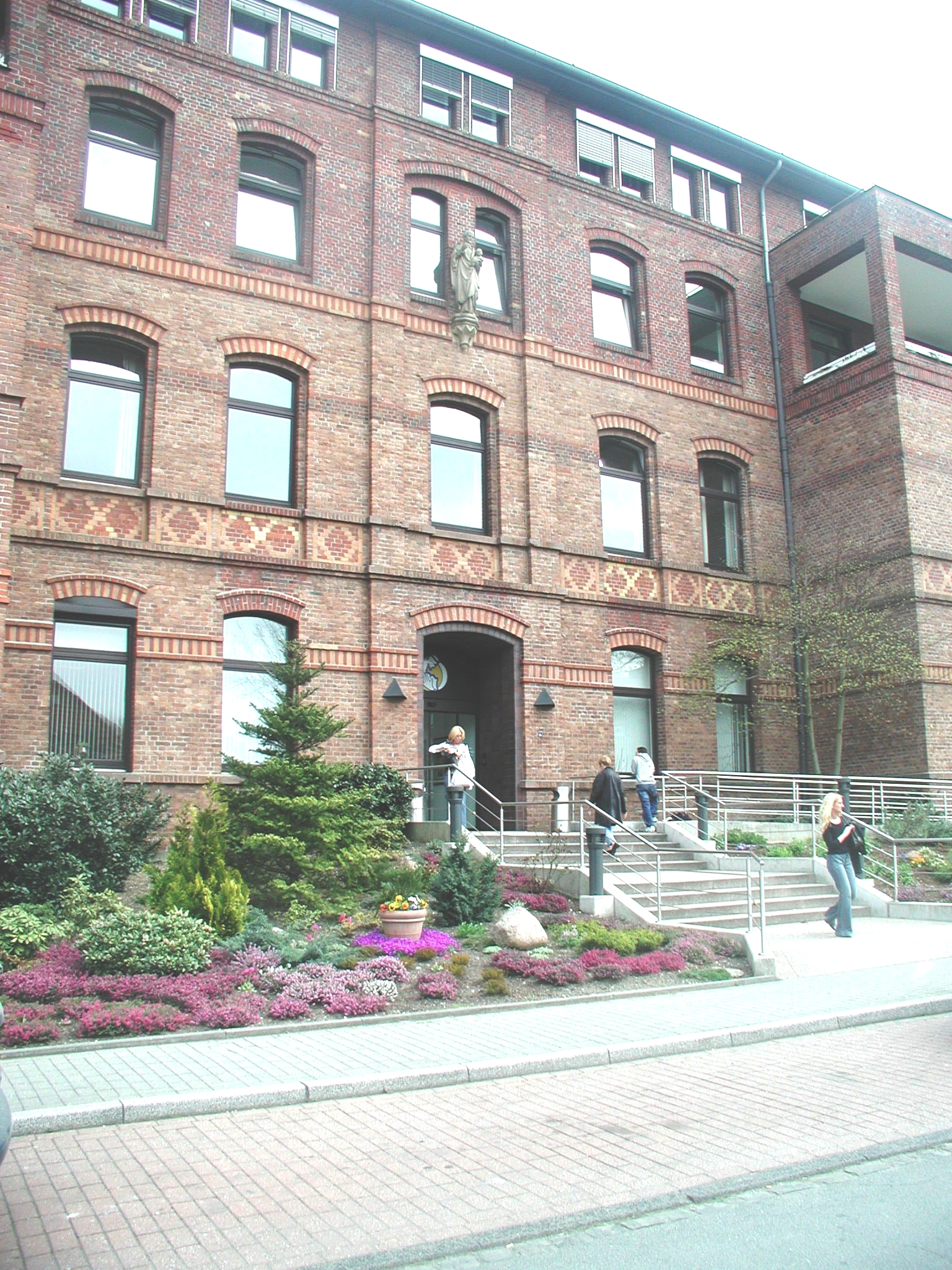 Krankenhaus Aussenansicht des St. Vincenz Krankenhaus in Essen Stoppenberg, ein Betriebsteil des Katholioschen Klinikums Essen.